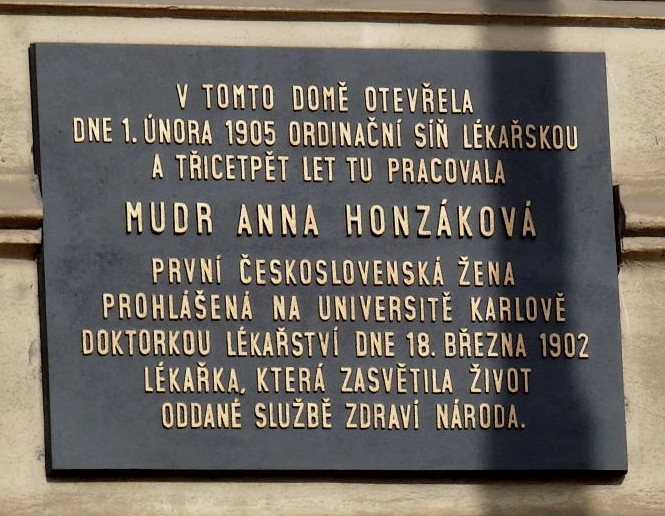 Text-Pamětní deska na domě v ulici Na Moráni v Praze 1